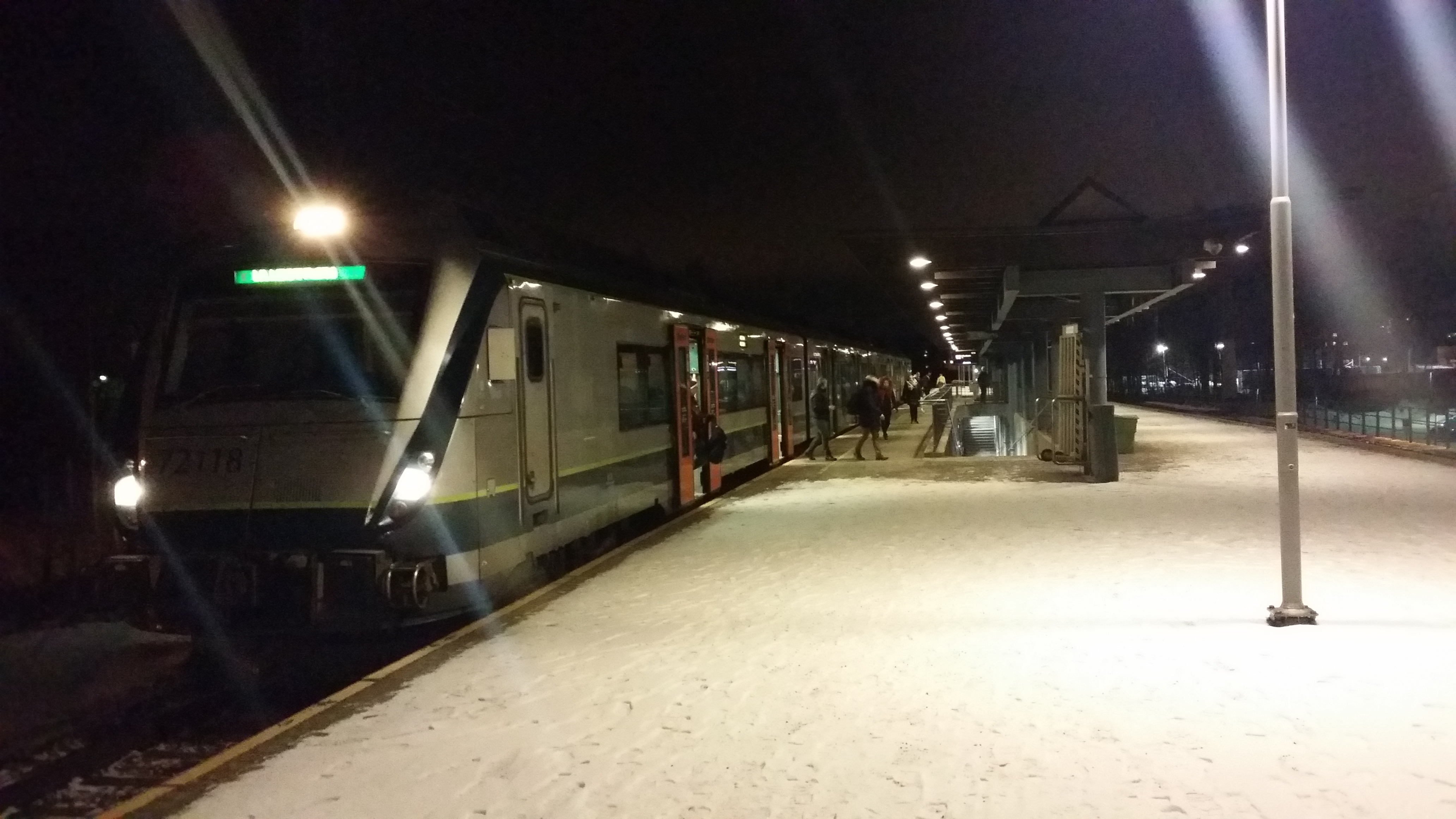 Lokaltog mot Lillestrøm stopper ved Fjellhamar.